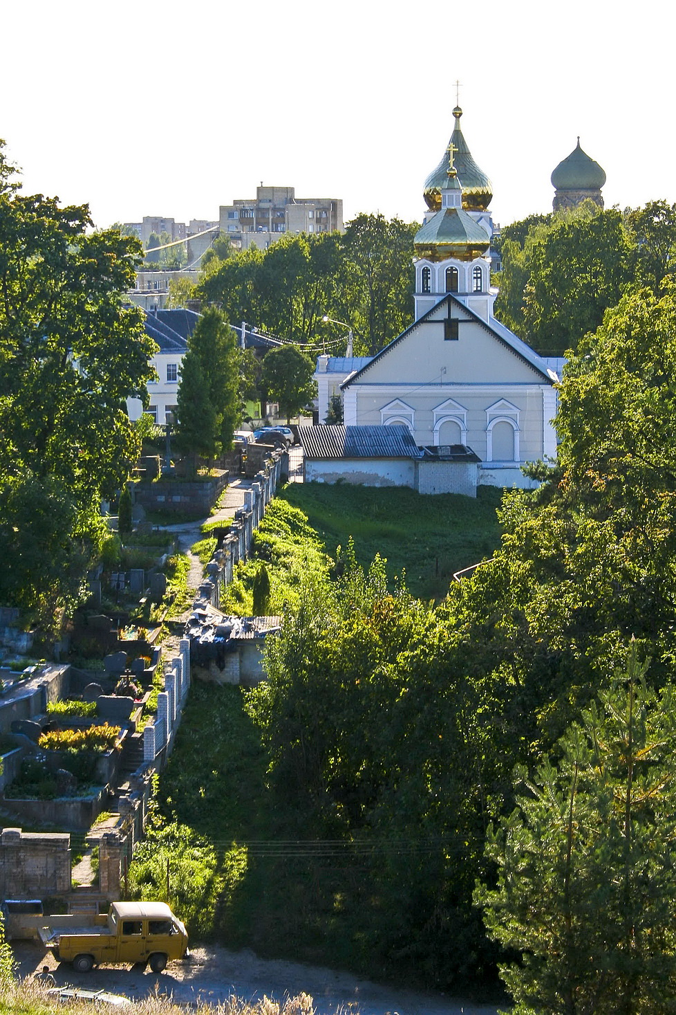 Naujininkai panorama